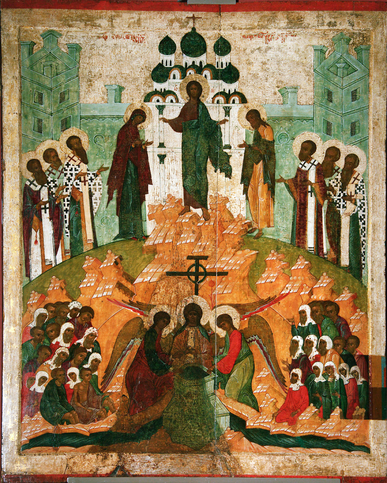 Происхождение честных древ Животворящего Креста Господня. 1510.